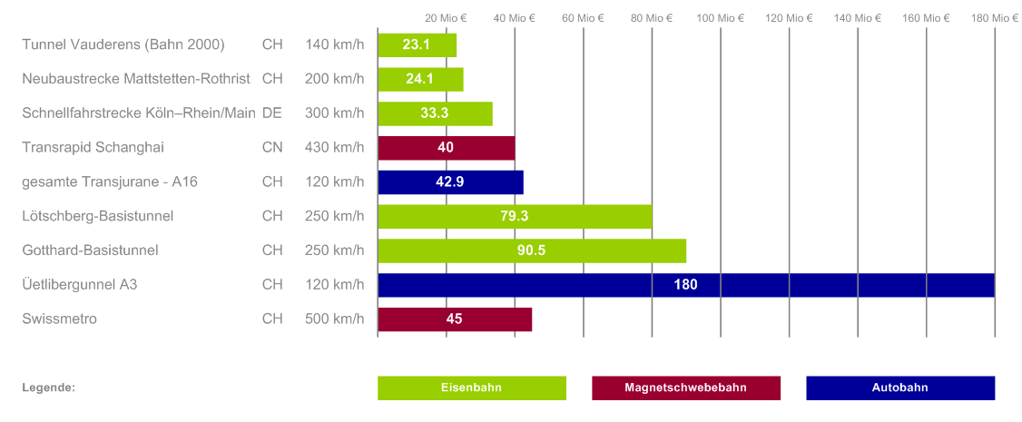 Vergleich der Infrastrukturkosten pro km verschiedener Verkehrsträger